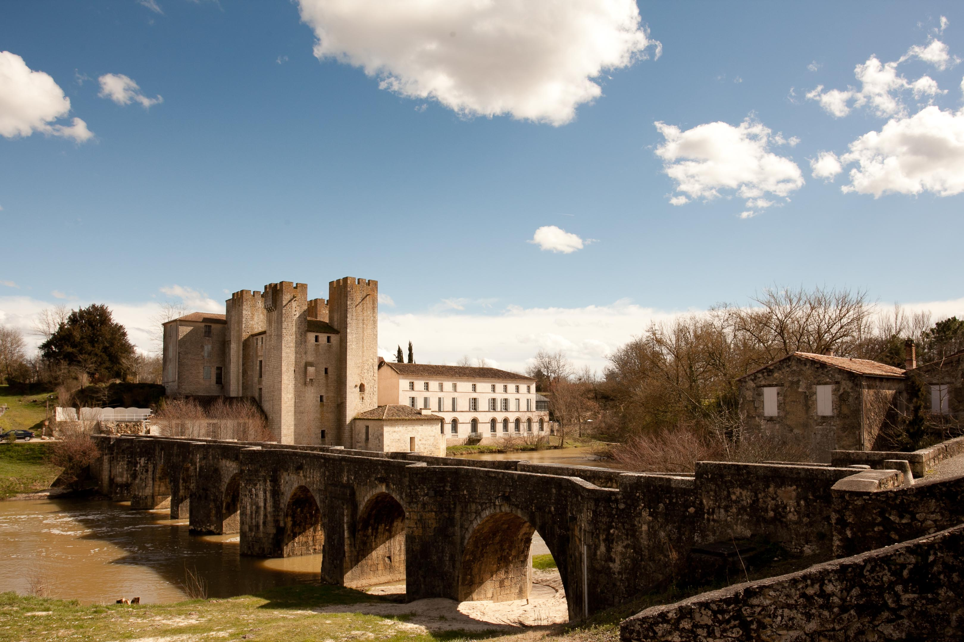 Pont Roman sur la Gélise (MH) menant au Moulin d'Henri IV dit Moulin de Barbaste